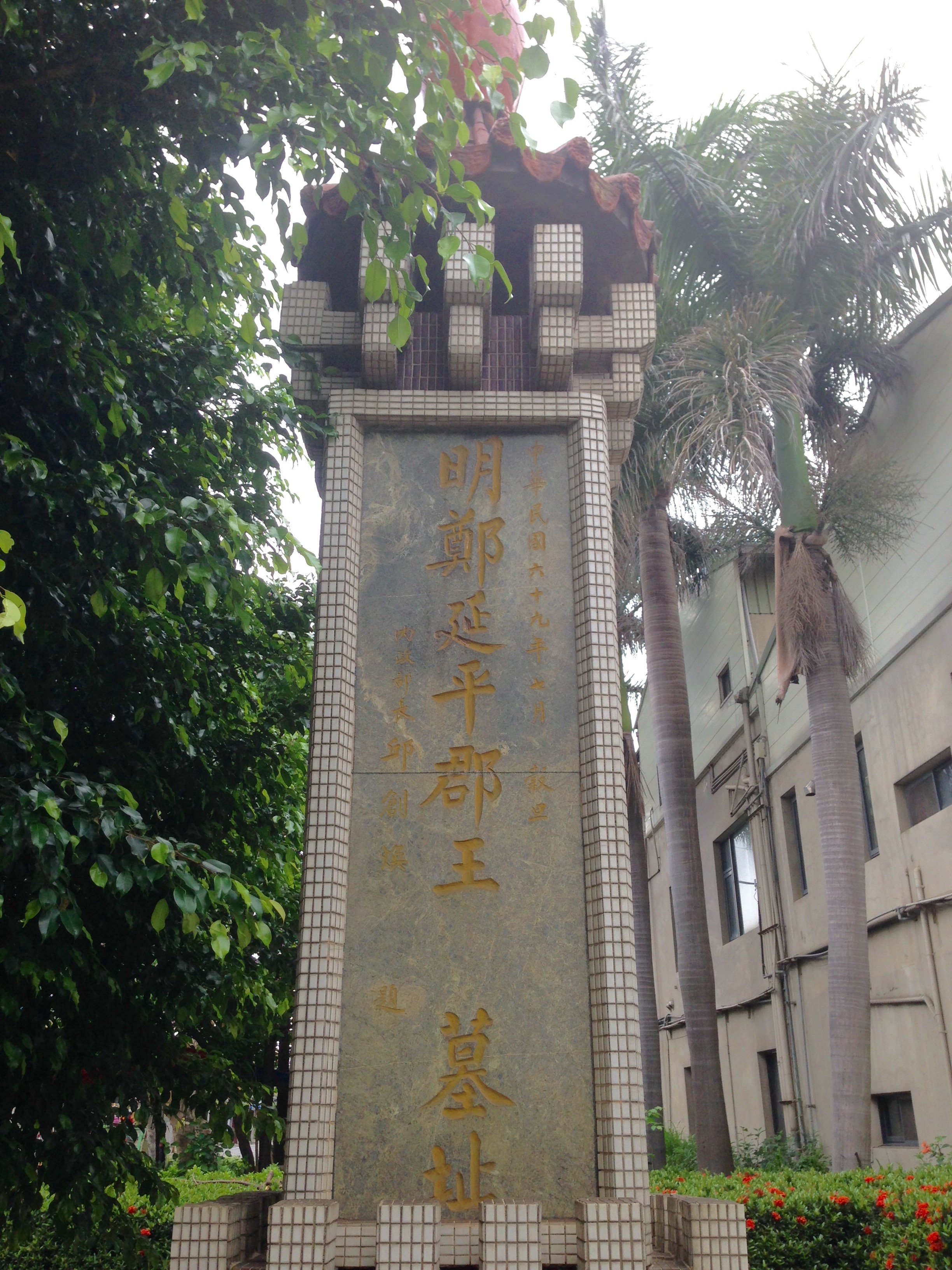 位於台南市永康區鹽洲里國聖街與正南六街交口處的鄭成功墓址紀念碑側面。